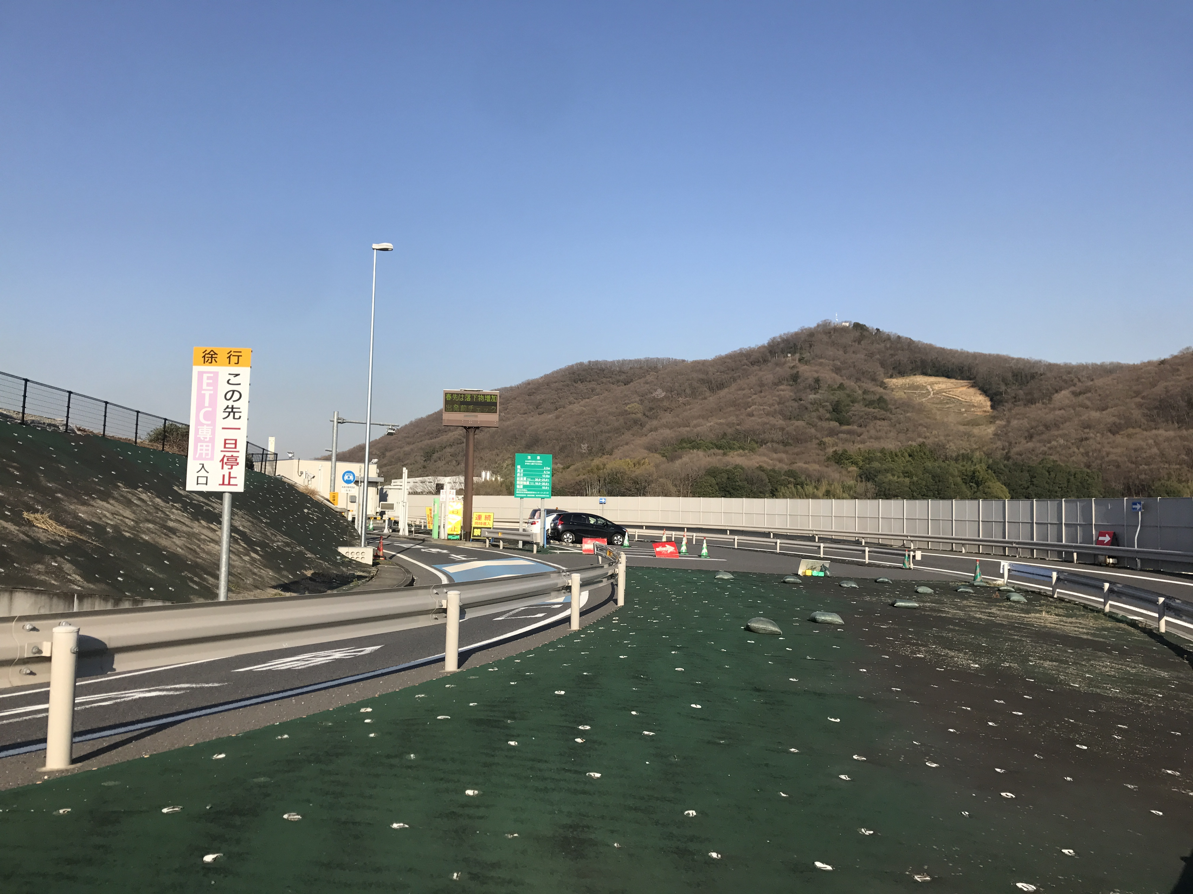 佐野SAスマートインターチェンジ下りの出入り口を一般道側から撮影